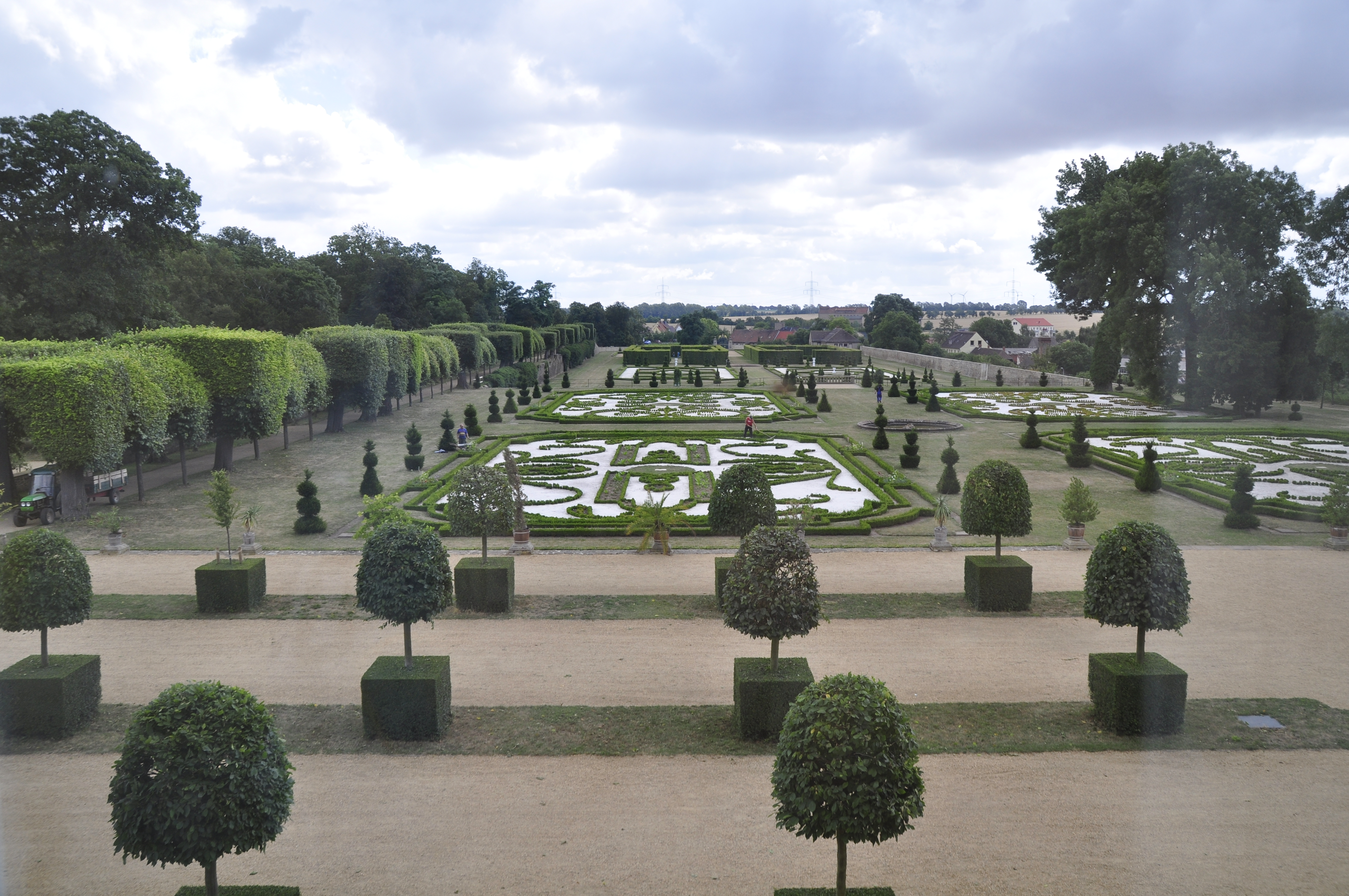 Barockpark Hundisburg, vom 1. Stock des Schlosses gesehen